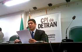 detran